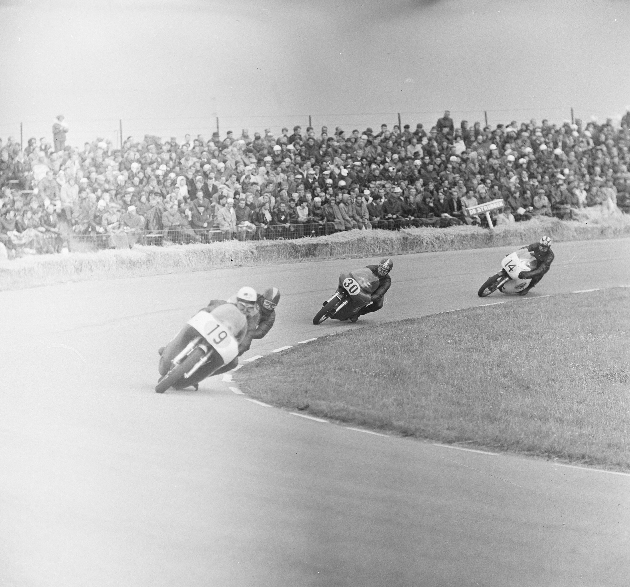 Collectie / Archief : Fotocollectie Anefo Reportage / Serie : TT Assen 1966 Beschrijving : 350cc race. Stuart Graham (19), Silvio Grassetti (30), John Cooper (14) Datum : 25 juni 1966 Locatie : Assen Trefwoorden : motorsport Fotograaf : Voets, Jan / Anefo Auteursrechthebbende : Nationaal Archief Materiaalsoort : Negatief (zwart/wit) Nummer archiefinventaris : bekijk toegang 2.24.01.03 Bestanddeelnummer : 919-2884